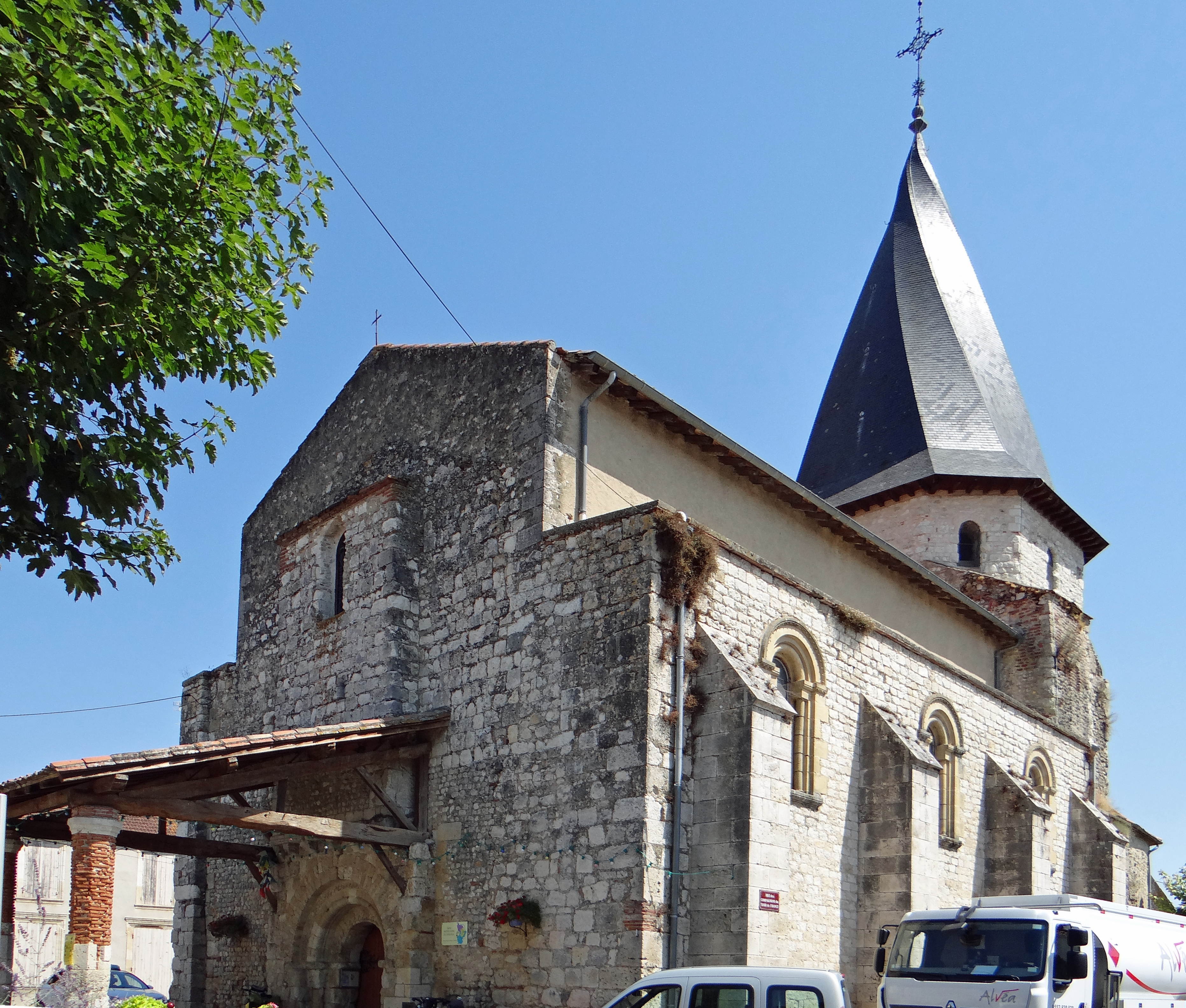 Sérignac-sur-Garonne - Église Notre-Dame-de-l'Assomption - Ensemble, côté sud